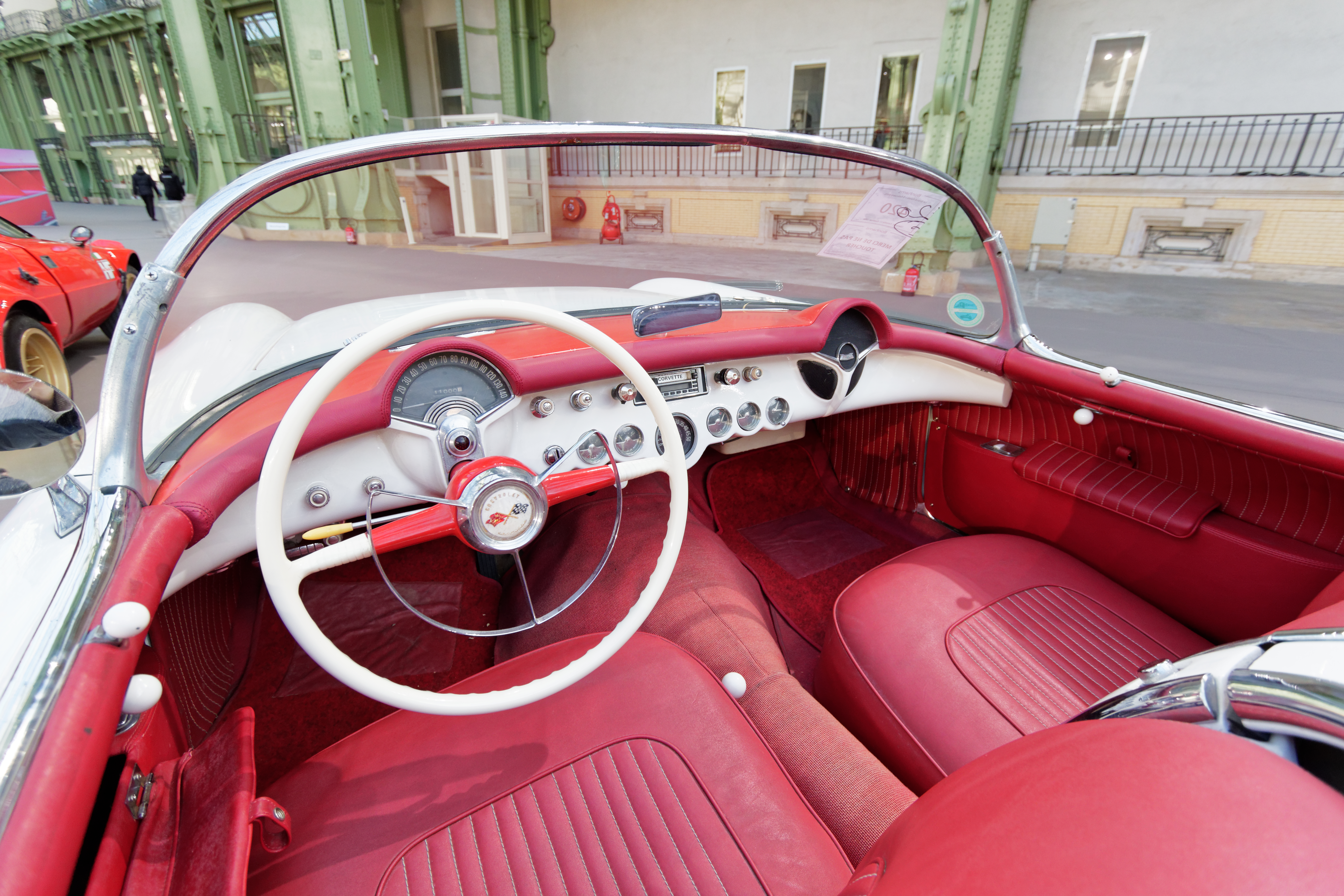 Un des véhicules présenté lors de la vente aux enchères Bonhams 2015 au Grand Palais de Paris.